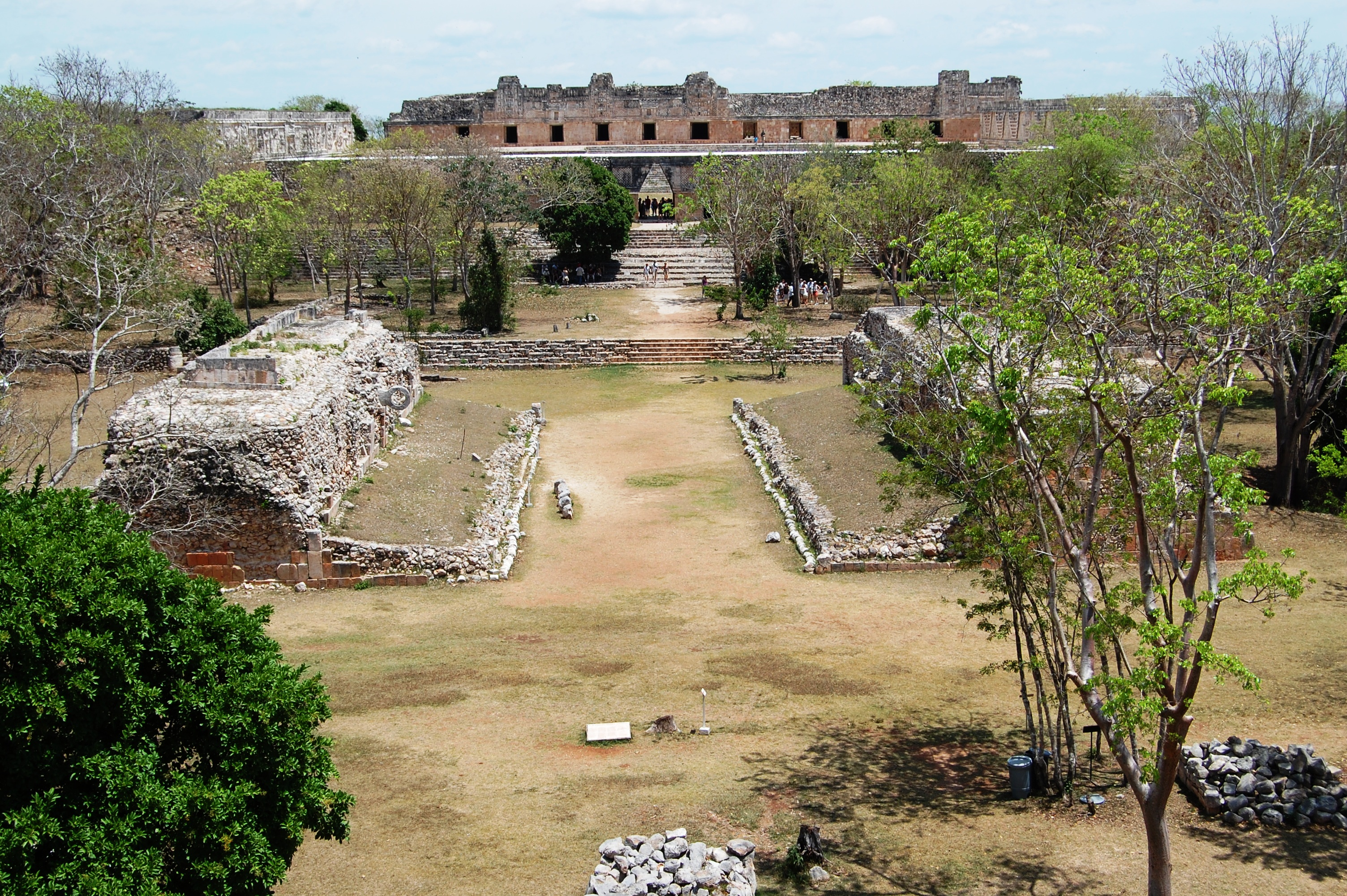 Uxmal, Mexico Juego de la pelota